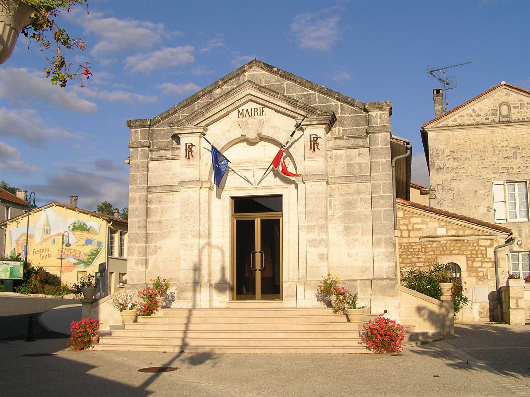 mairie de Voeuil-et-Giget